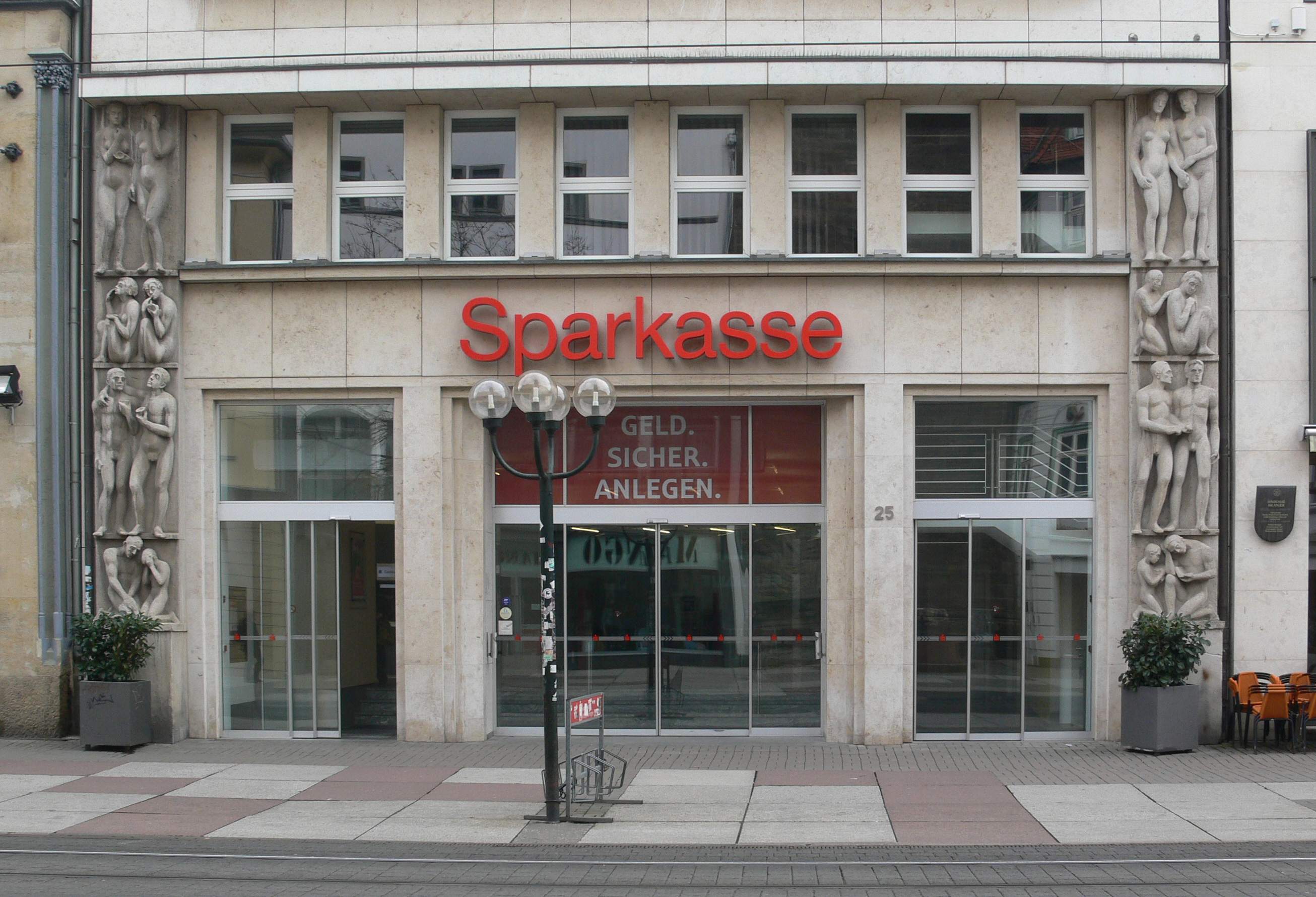 Sparkasse, Anger 25, Erfurt Reliefs von Hans Walther, links: leichtsinnige Geldverschwendung und ihre Folgen, rechts: vorsorgendes Sparen und seine Folgen